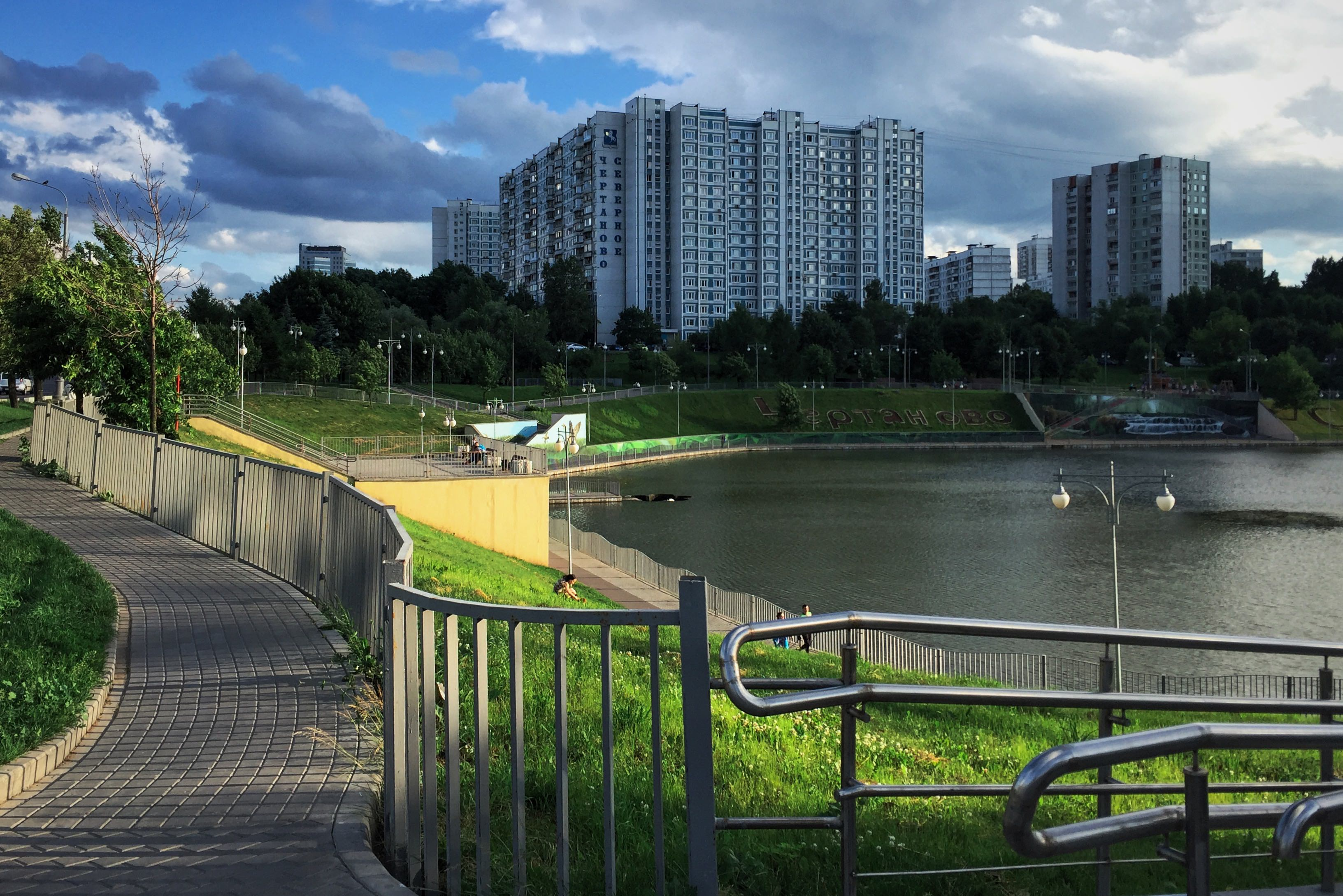 Варшавское шоссе. Малый Чертановский пруд Moscow in 2016; Москва в 2016